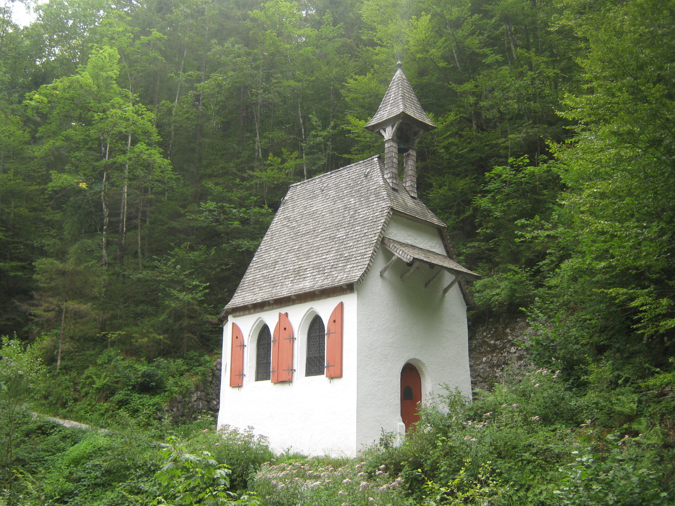 Waldkapelle St. Johann und Paul bei St. Bartholomä am Königssee, von Nordwesten (von der Brücke über den Eisbach aus)